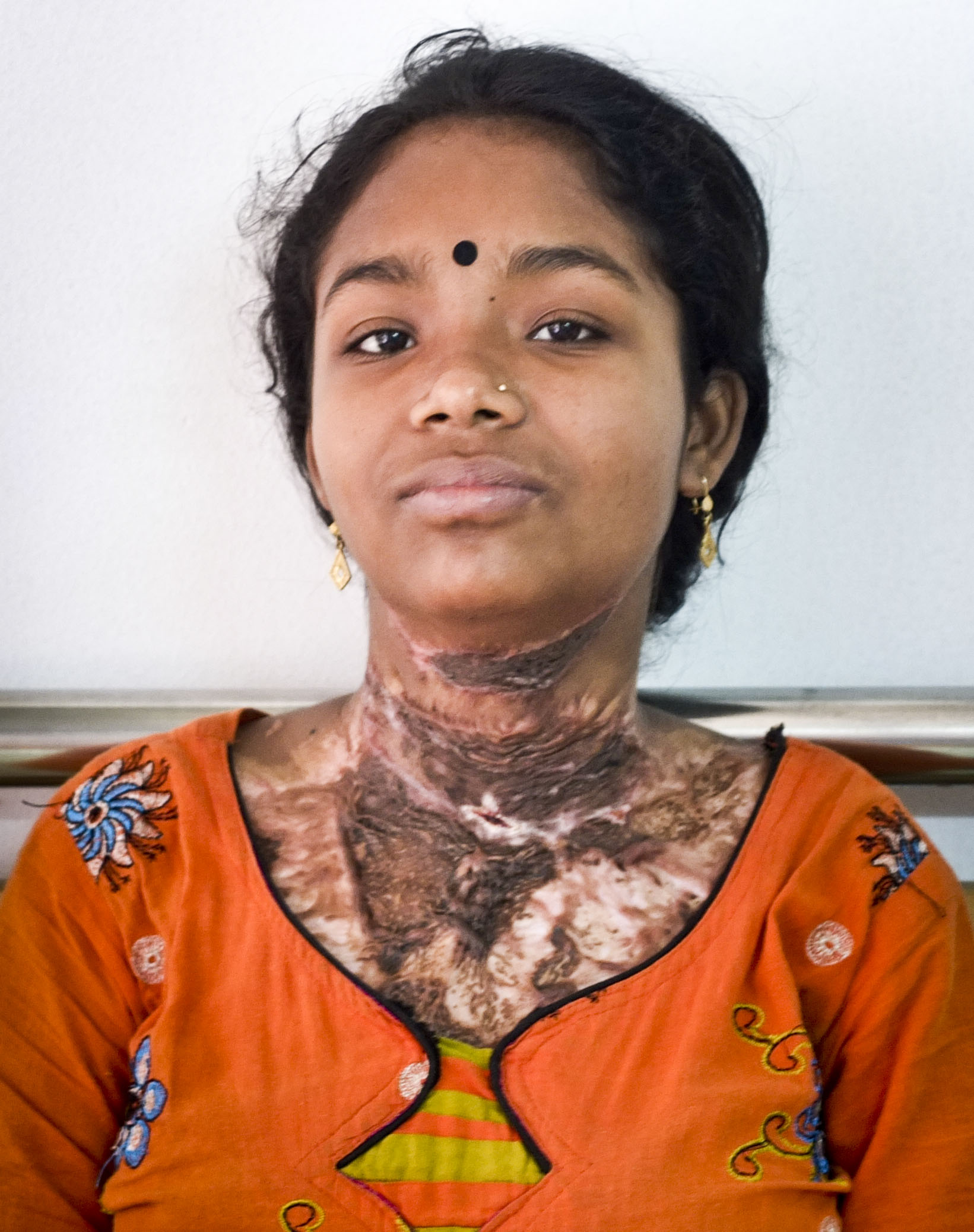 Retrato sobreviviente ataque ácido violencia de género